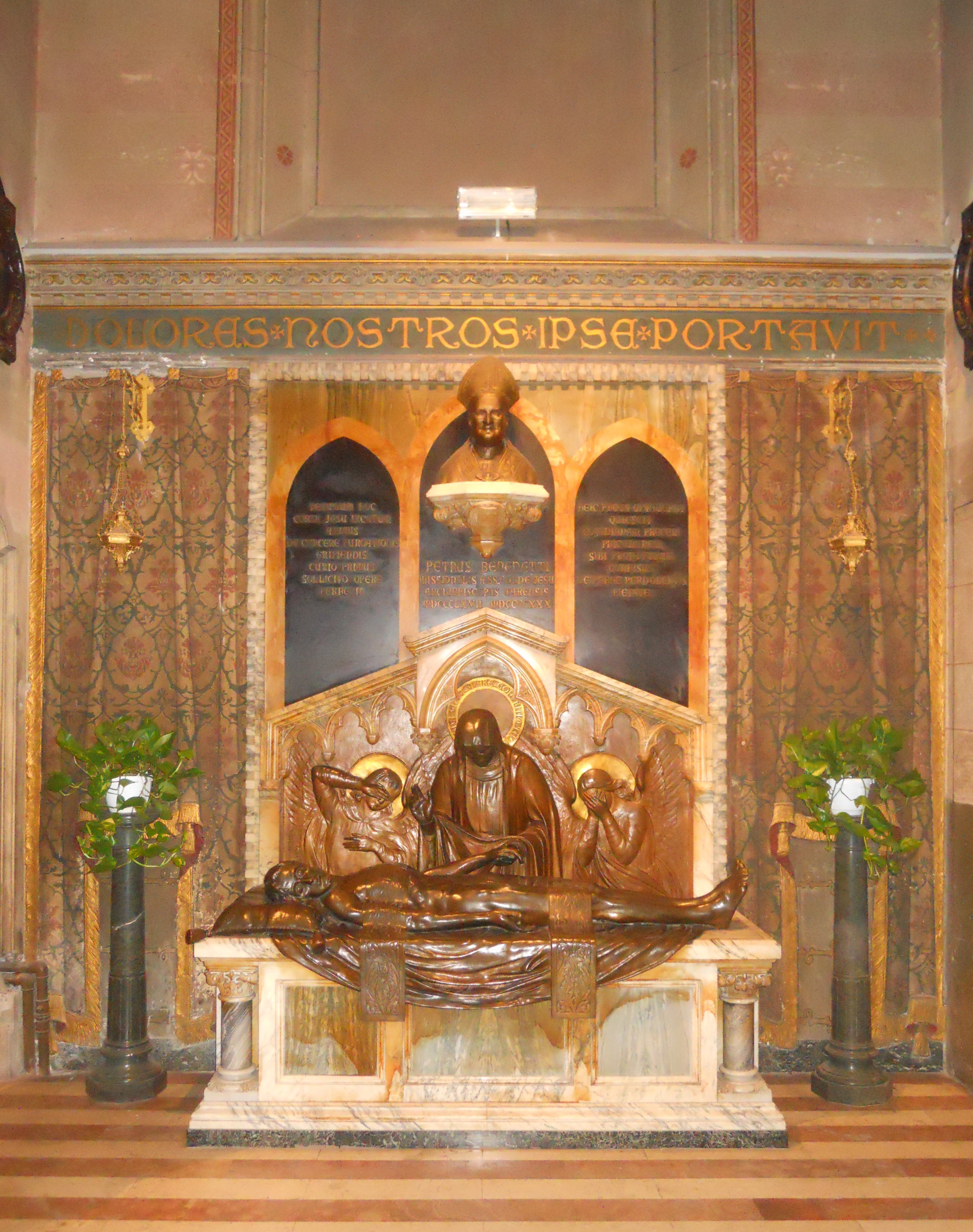 Il monumento funebre di monsignor Pietro Benedetti nella chiesa del Sacro Cuore di Gesù in Prati a Roma.